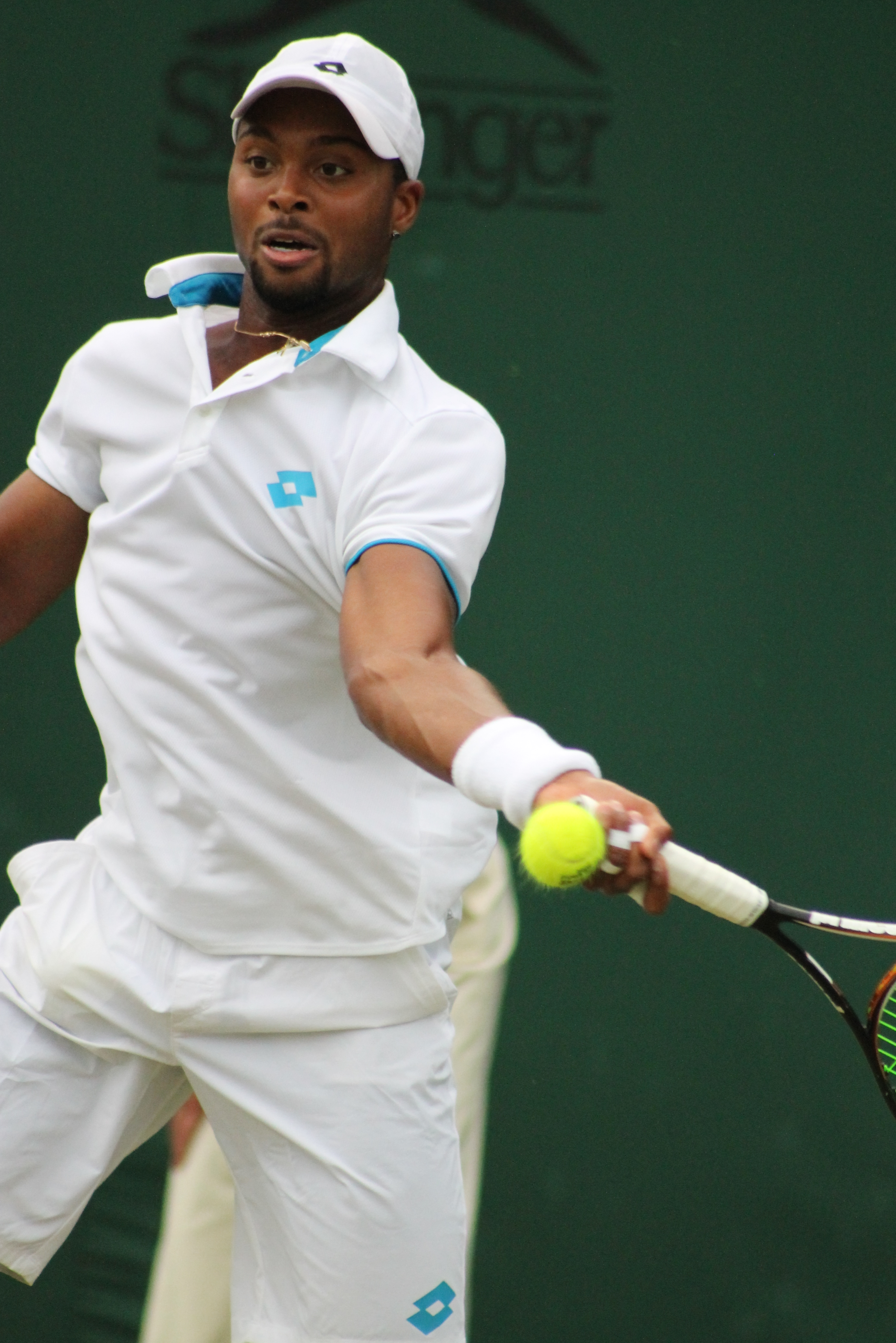 Young WM14 (23)